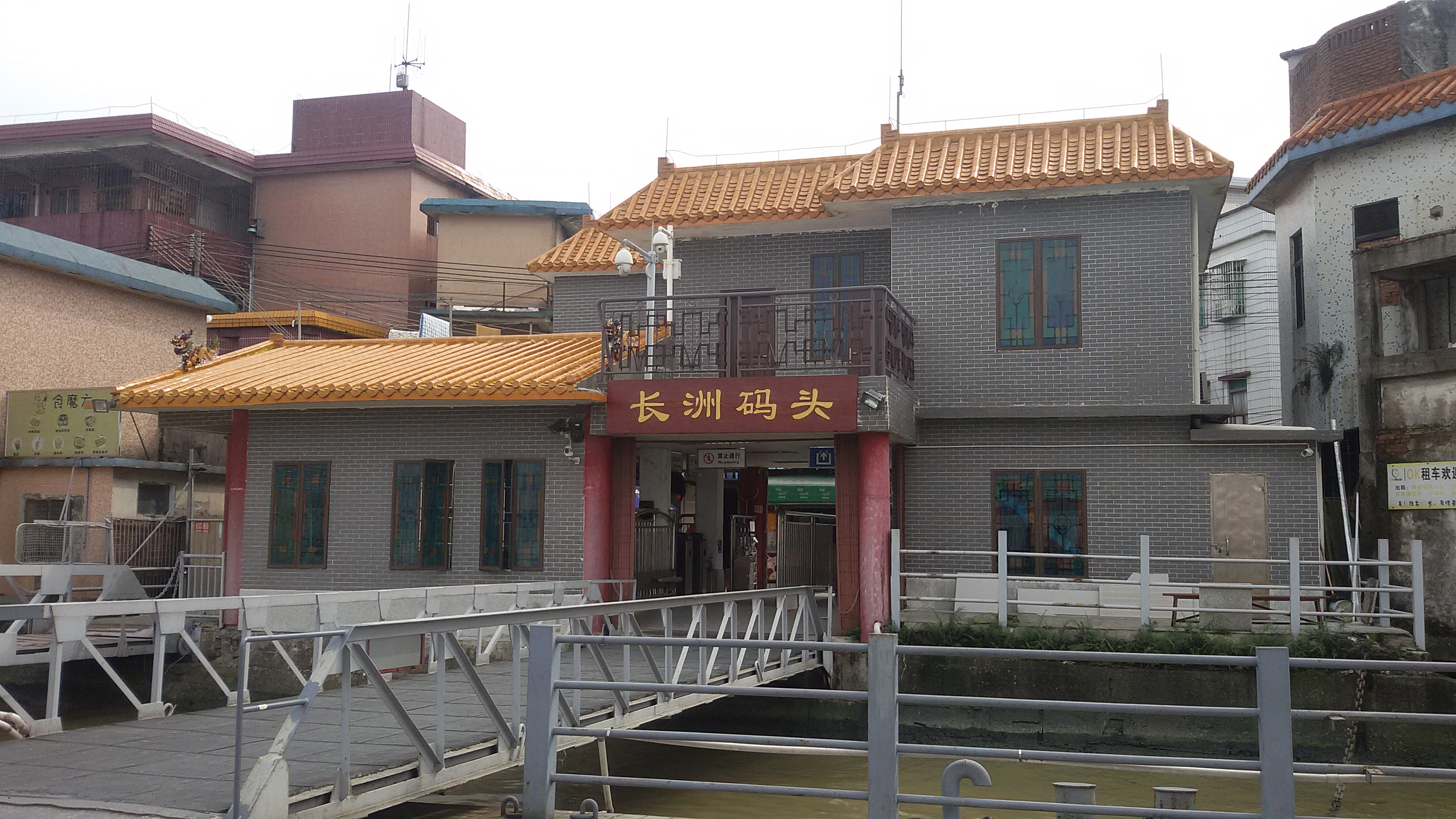 粵語: 長洲碼頭